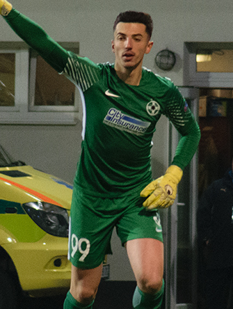 Andrei Vlad